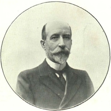 Arsenio Linares, Ministro de la Guerra, obra del fotógrafo Christian Franzen, recogido en la revista española Álbum Salón.